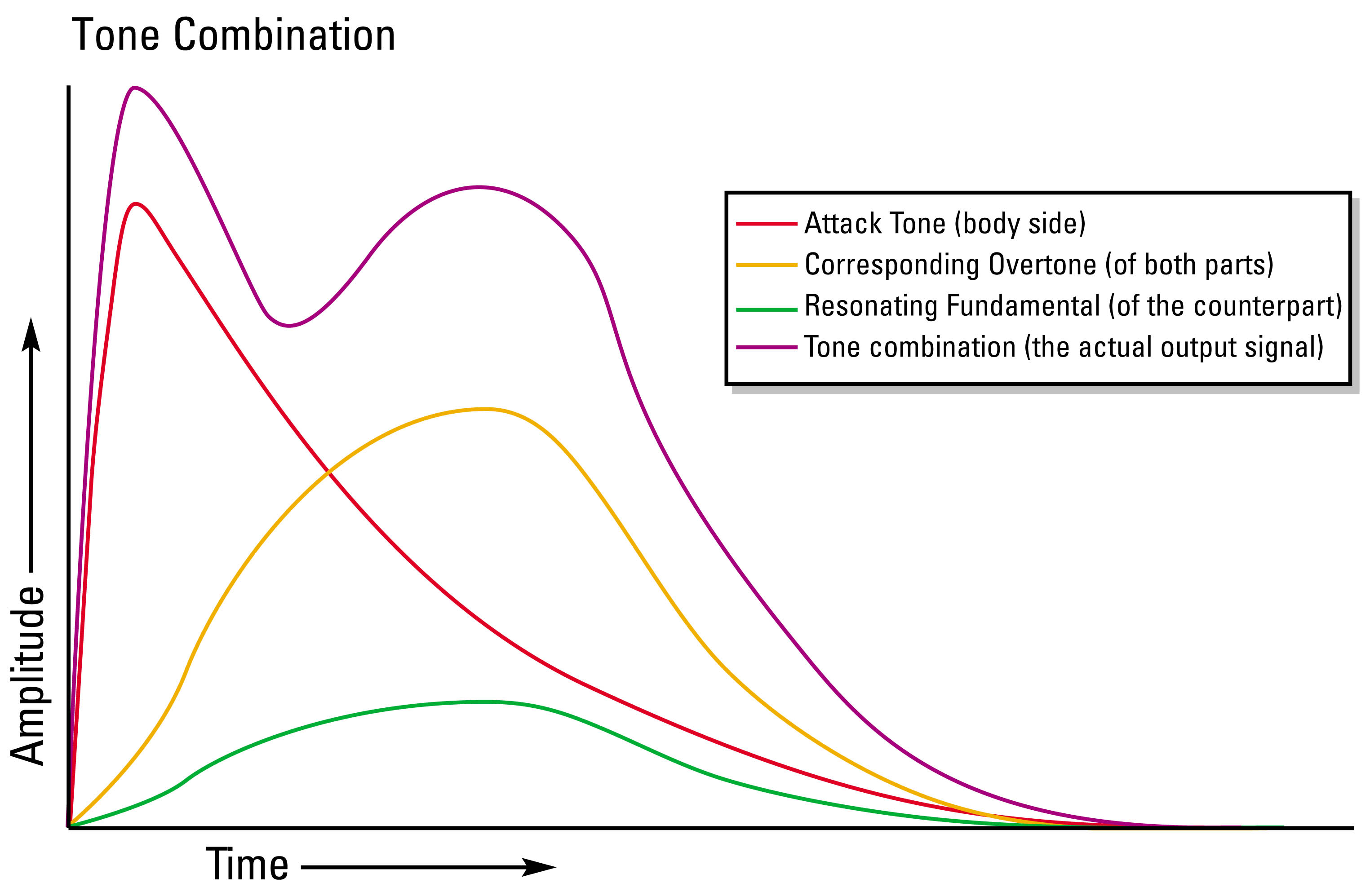 my own drawing